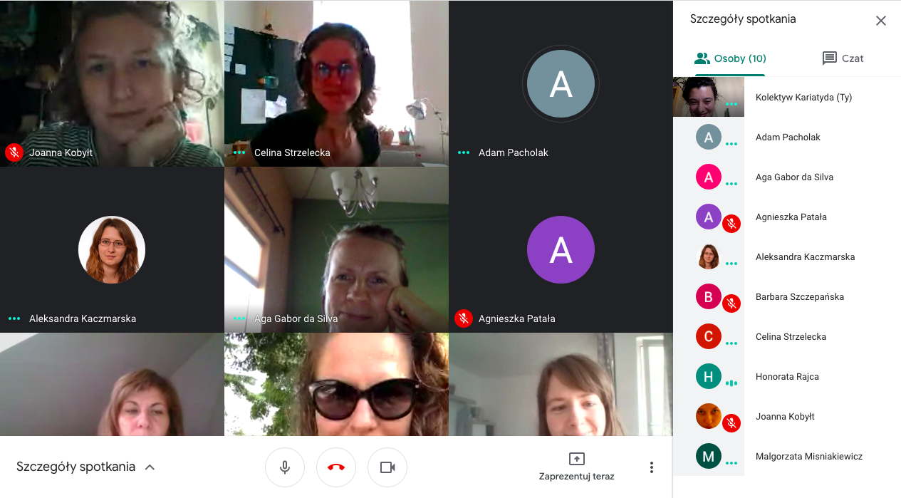 Kolektyw Kariatyda, 8. Edyton: SYMPOZJASTKI, 12.6.2020 – maraton edycji haseł o kobietach związanych z Sympozjum Plastycznym Wrocław '70 w ramach roku jubileuszowego pn. Sympozjum Wrocław 70/20. Osoby uczestniczące: Zoedyta, Evidamii019, Barbska, CelStrzel, PaAgaPa, Honorata Rajca, malgorzata, Agusaplb, Byolkak, Asinax. Wikiprojekt